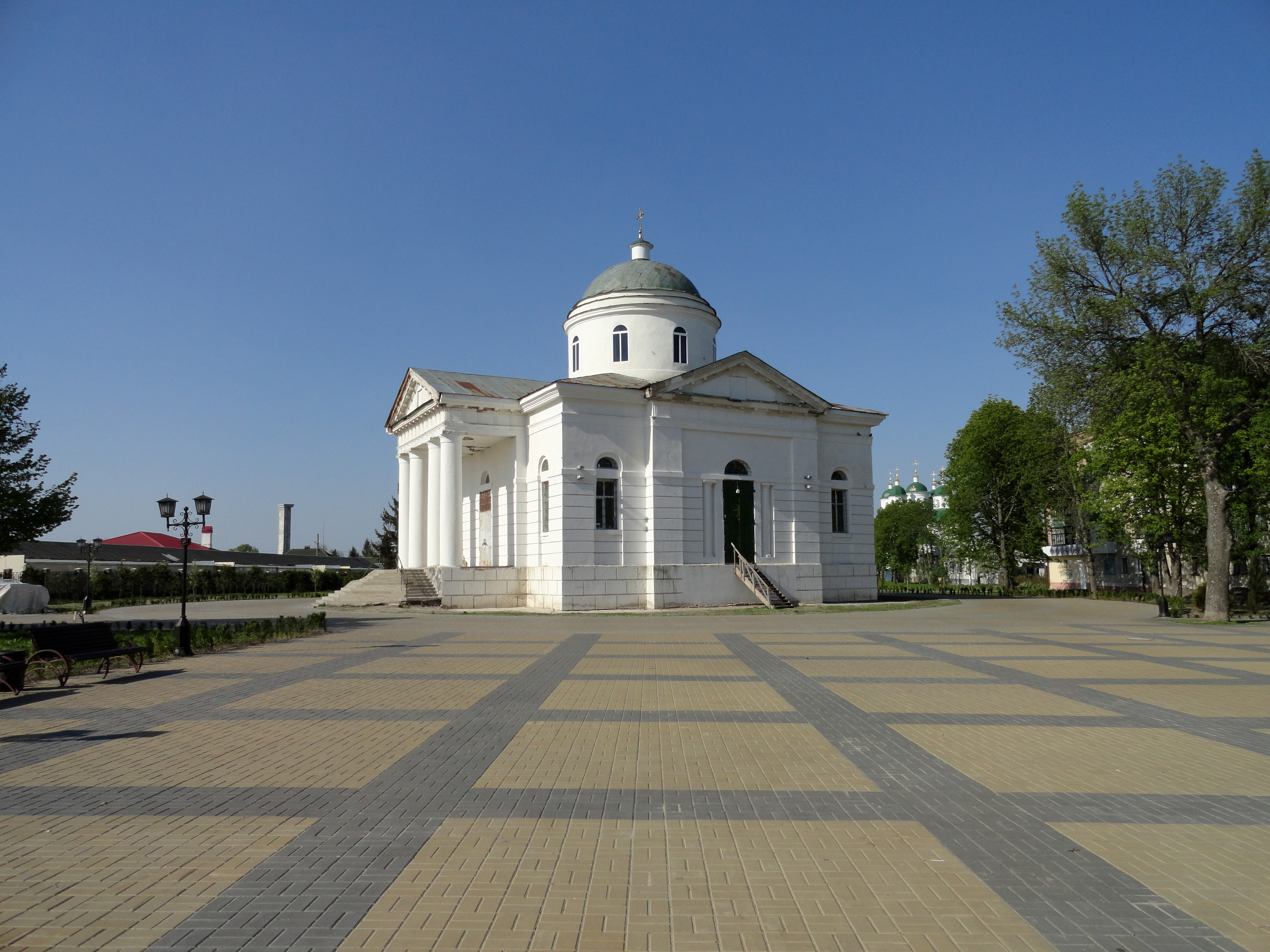 Собор_Різдва_Богородиці_Прилуки_(1).JPG: Собор Різдва Богородиці (УПЦ КП), м. Прилуки, квітень 2012 року